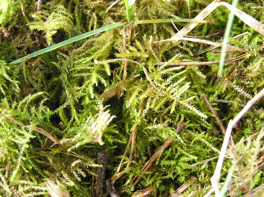 Eurhynchium praelongum auf Waldboden in der Nähe des Ahrtals.